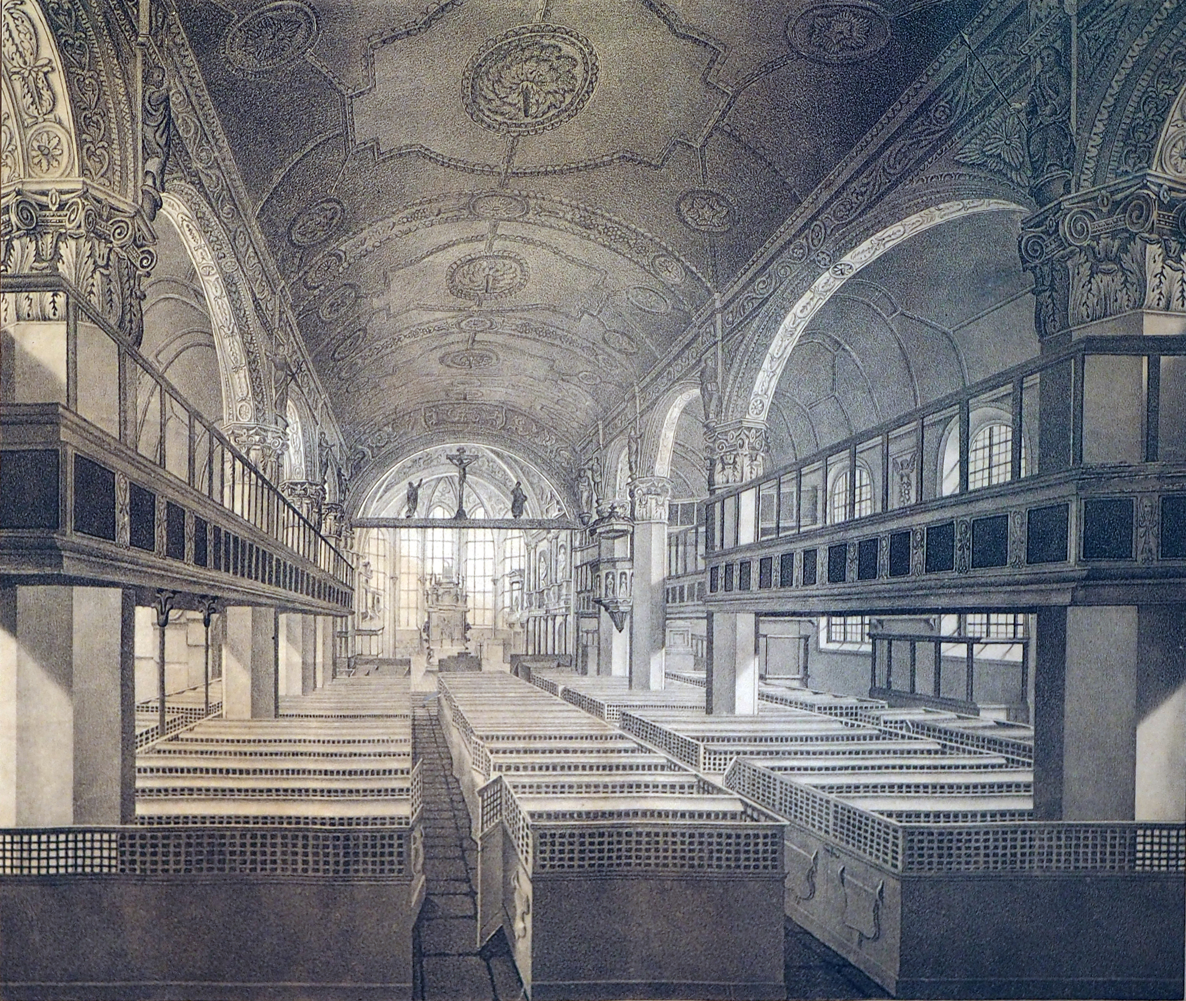 Innenansicht der Stadtkirche mit alter Bestuhlung